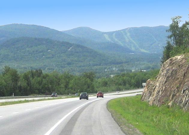 Vue à partir de l'autoroute 73 de Stoneham Qc Canada